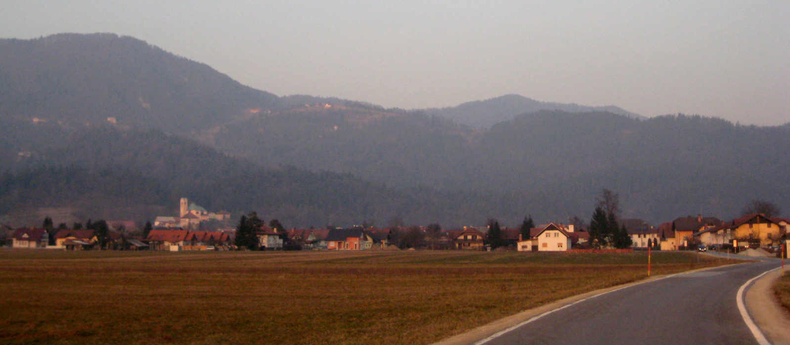 Dolsko, village in Slovenia